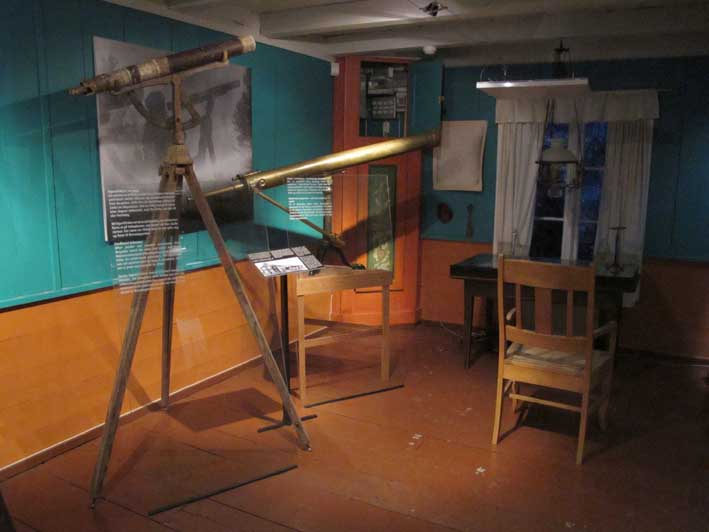 Einbustugu